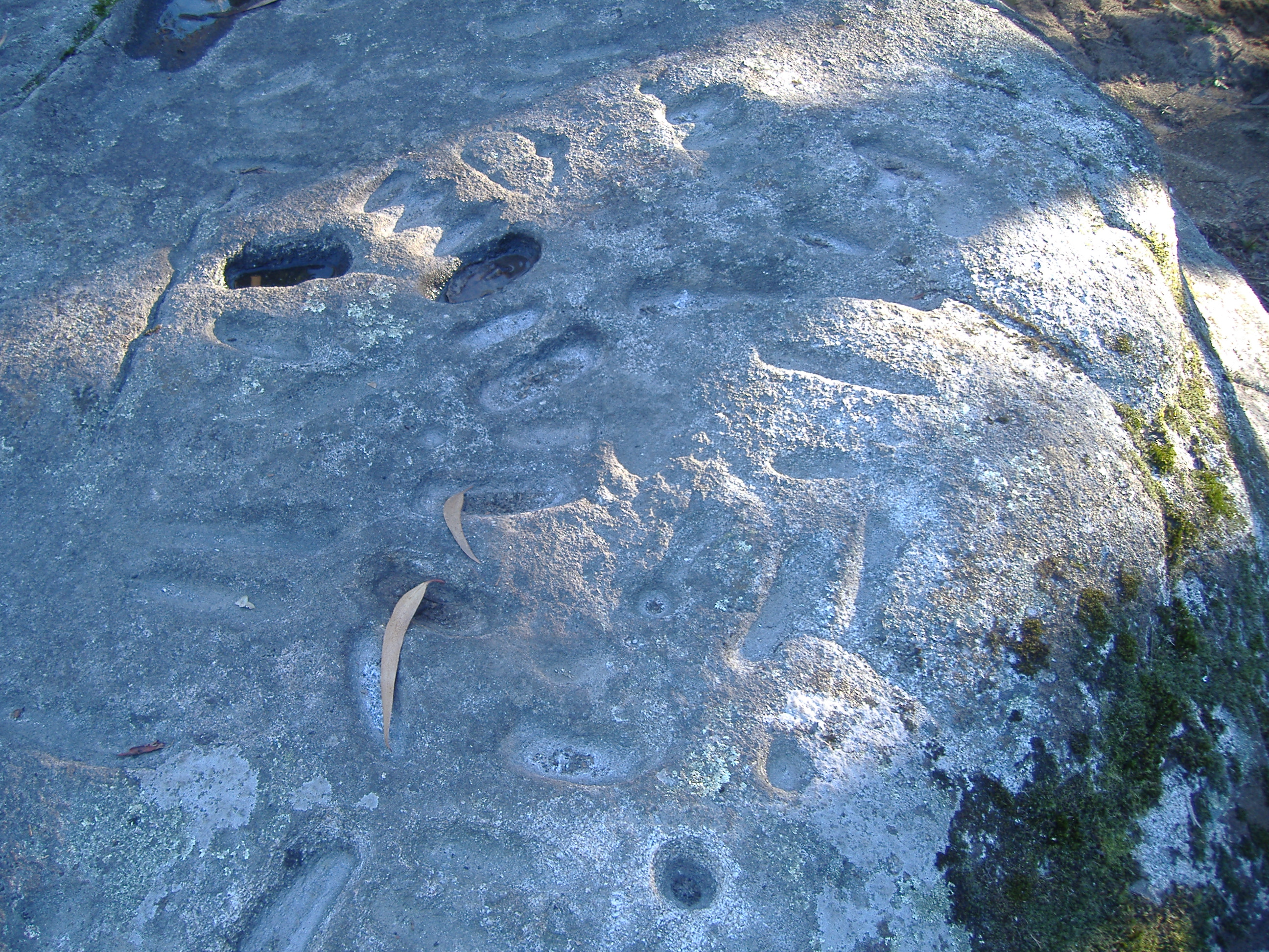 Gravuras Rupestres de Lomar - Luzim Este núcleo de arte rupestre integra quase 100 insculturas de motivos variados, talhados num pequeno penedo granítico aplanado que se destaca do solo. Entre os simbolos representados abundam os pedamorfos, agrupados e alinhados em diferentes posições, inúmeras fossetes e ainda alguns motivos halteriformes e paracirculares. Desconhece-se o verdadeiro significado destes núcleos artísticos bem como a simbologia dos motivos representados. Os pedamorfos, por exemplo, muito comuns neste tipo de arte rupestre, são normalmente interpretados como a representação esquemática do pé humano, podendo associar-se à ideia de um percurso ou caminhada. Há contudo, várias interpretações que relacionam esta arte esquemática e abastracta não só com a sacralização dos lugares, mas também como a delimitação territorial e/ou com rituais eniciáticos.